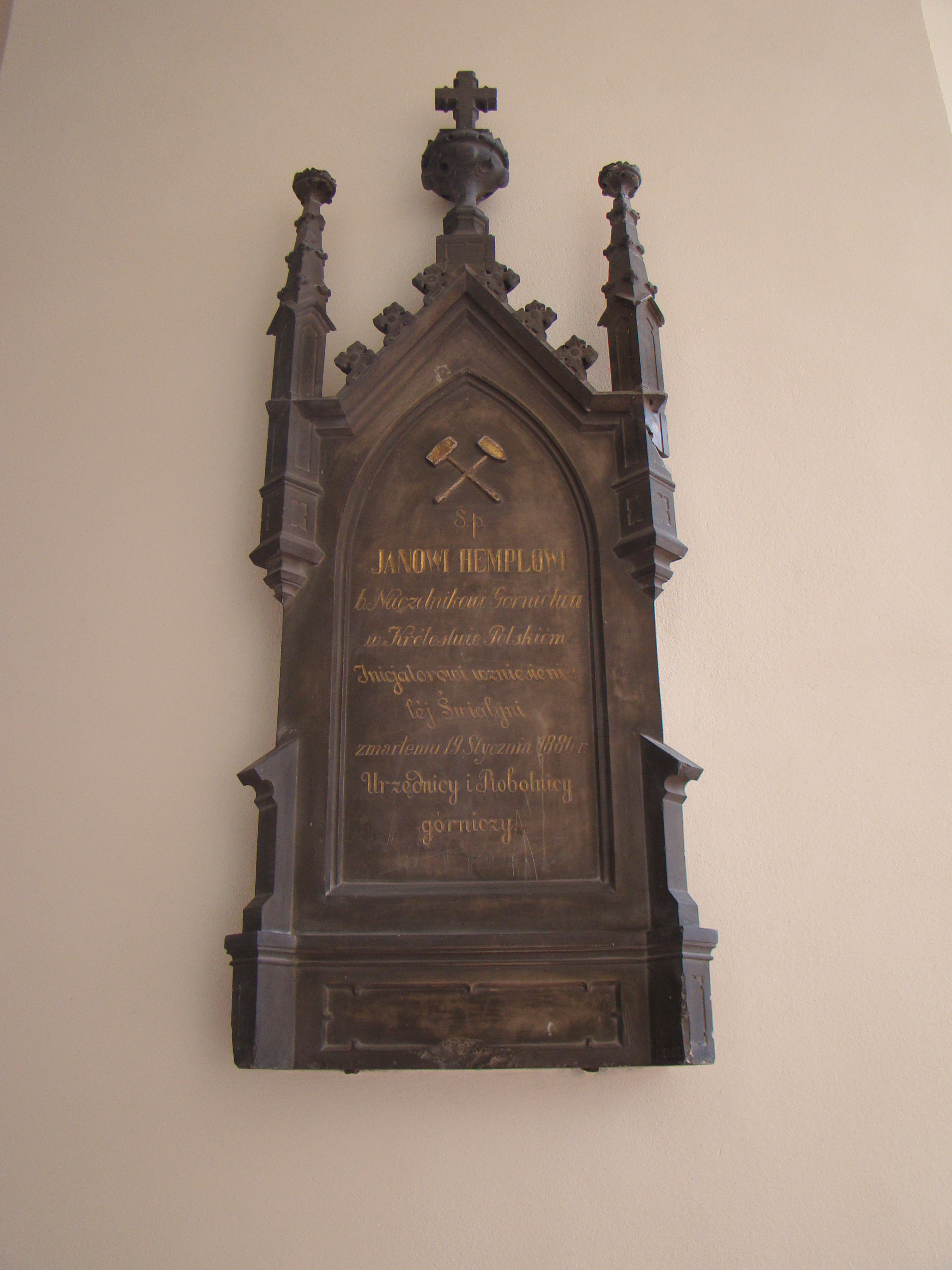 Dąbrowa Górnicza, Bazylika Najświętszej Maryi Panny Anielskiej, 1875, 1898-1912